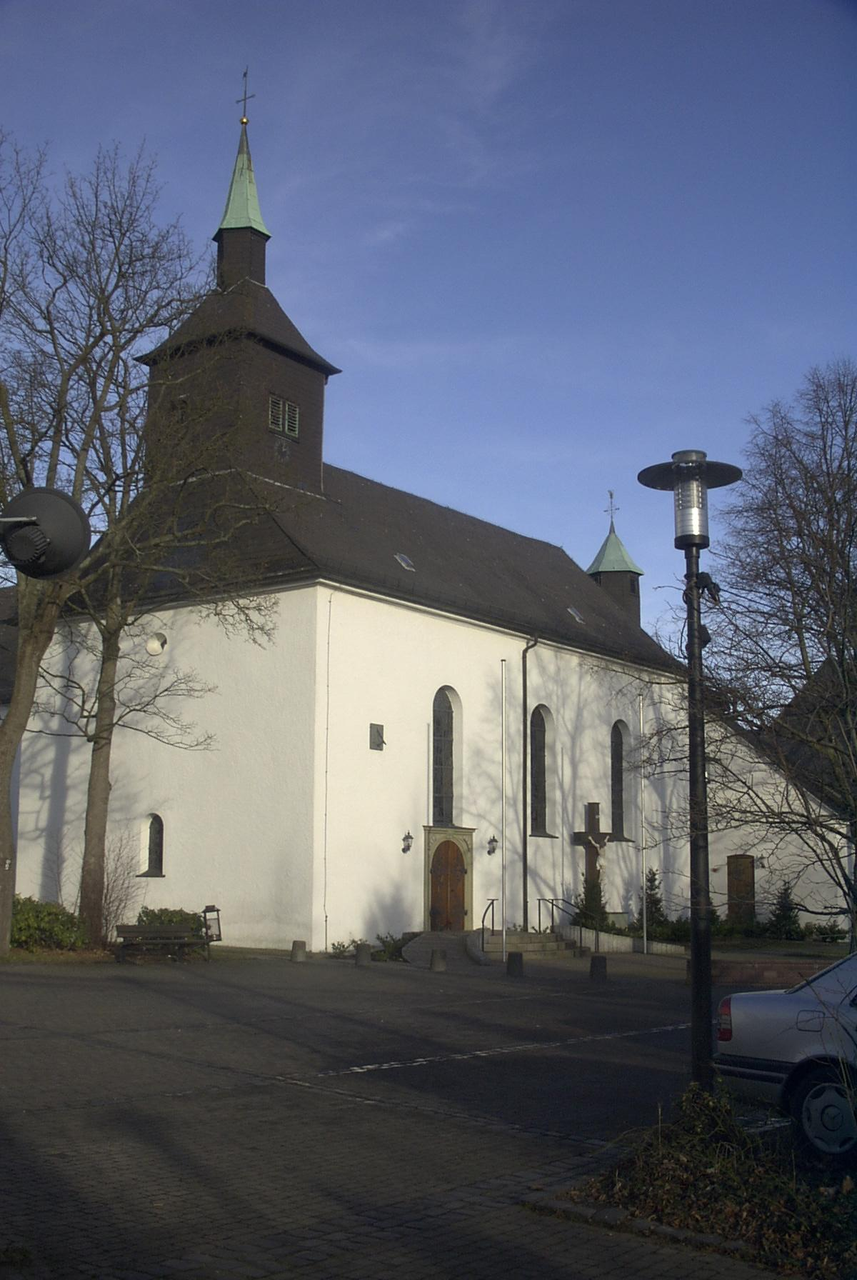 St. Urbanuskirche in Voßwinkel